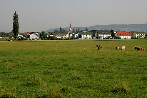 Ettiswil vom Schloss Wyher her gesehen